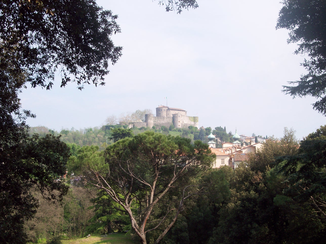 Castello di Gorizia. Foto scattata da Nick1915